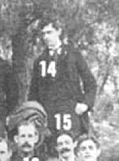 origine